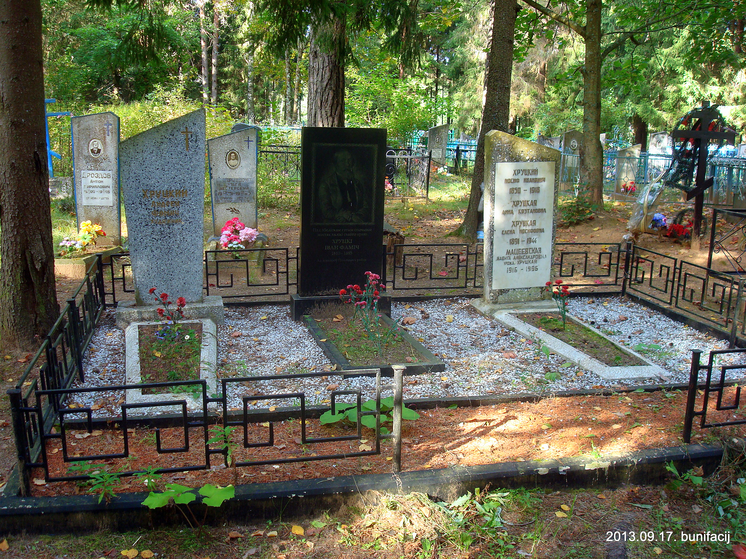 Родовое захоронение Хруцких